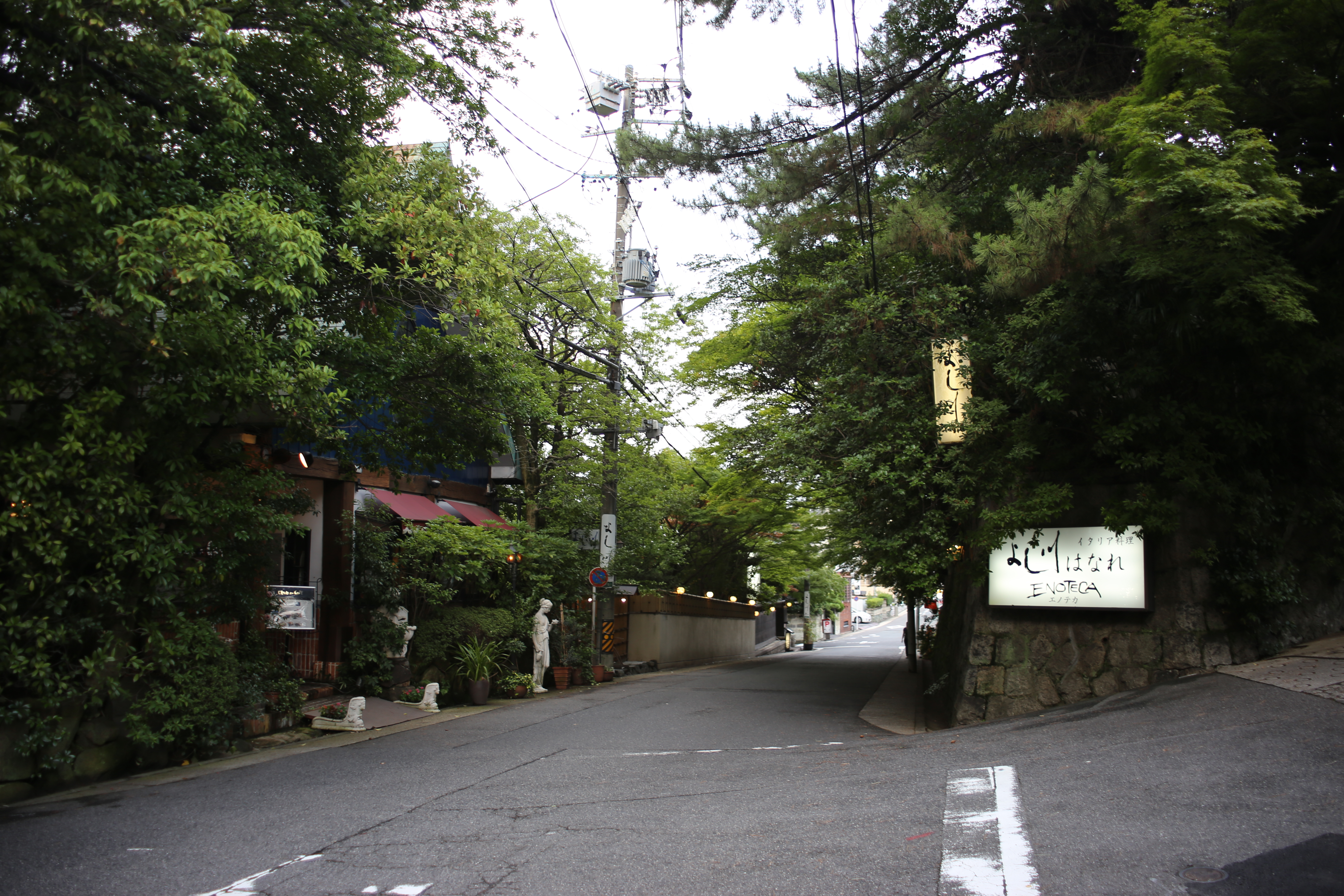 名古屋市千種区堀割町のよし川経営のレストランなどがある一帯を西側公道より撮影